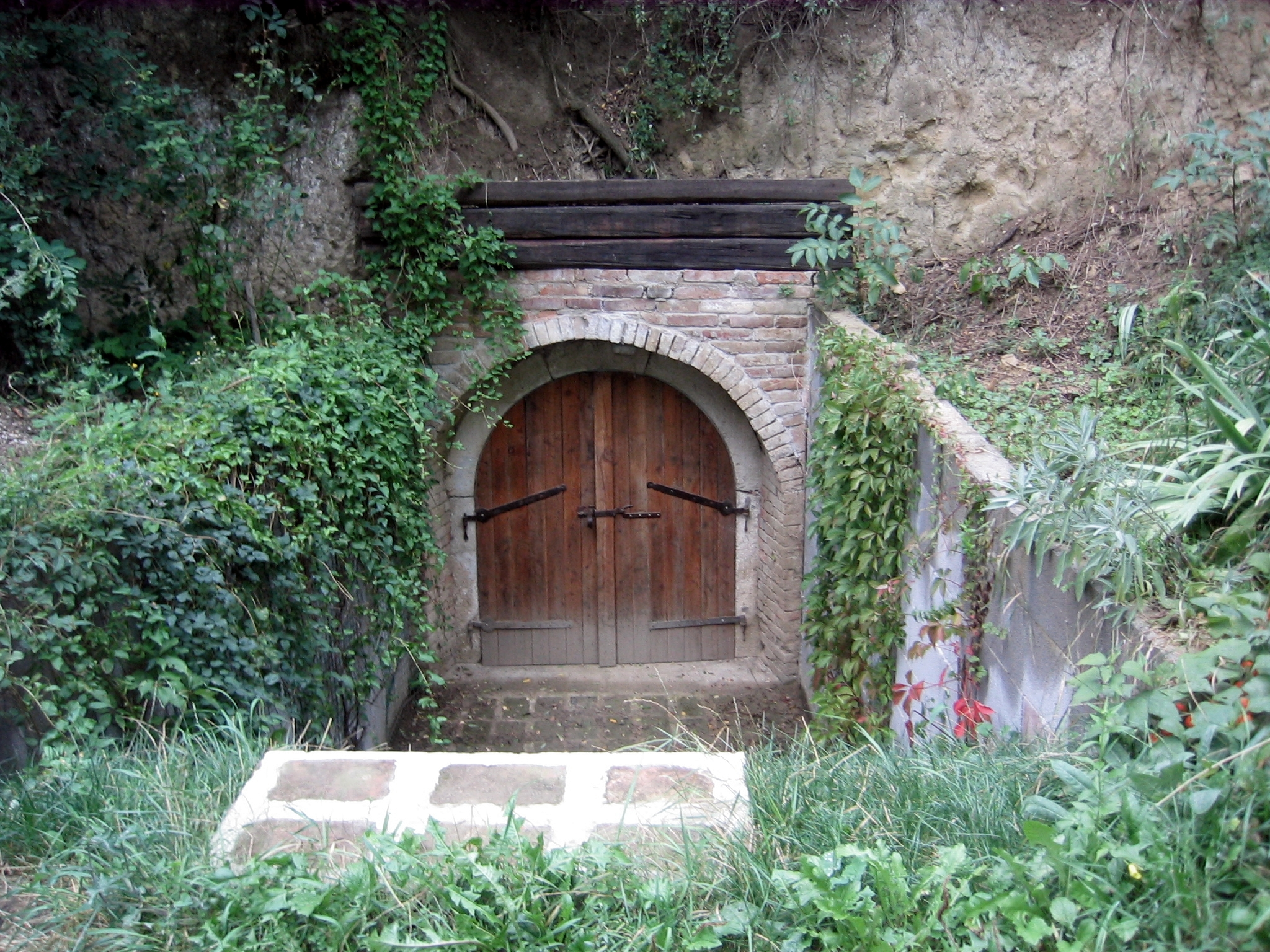 Mühlbergkellergasse Sitzendorf Objekt 8